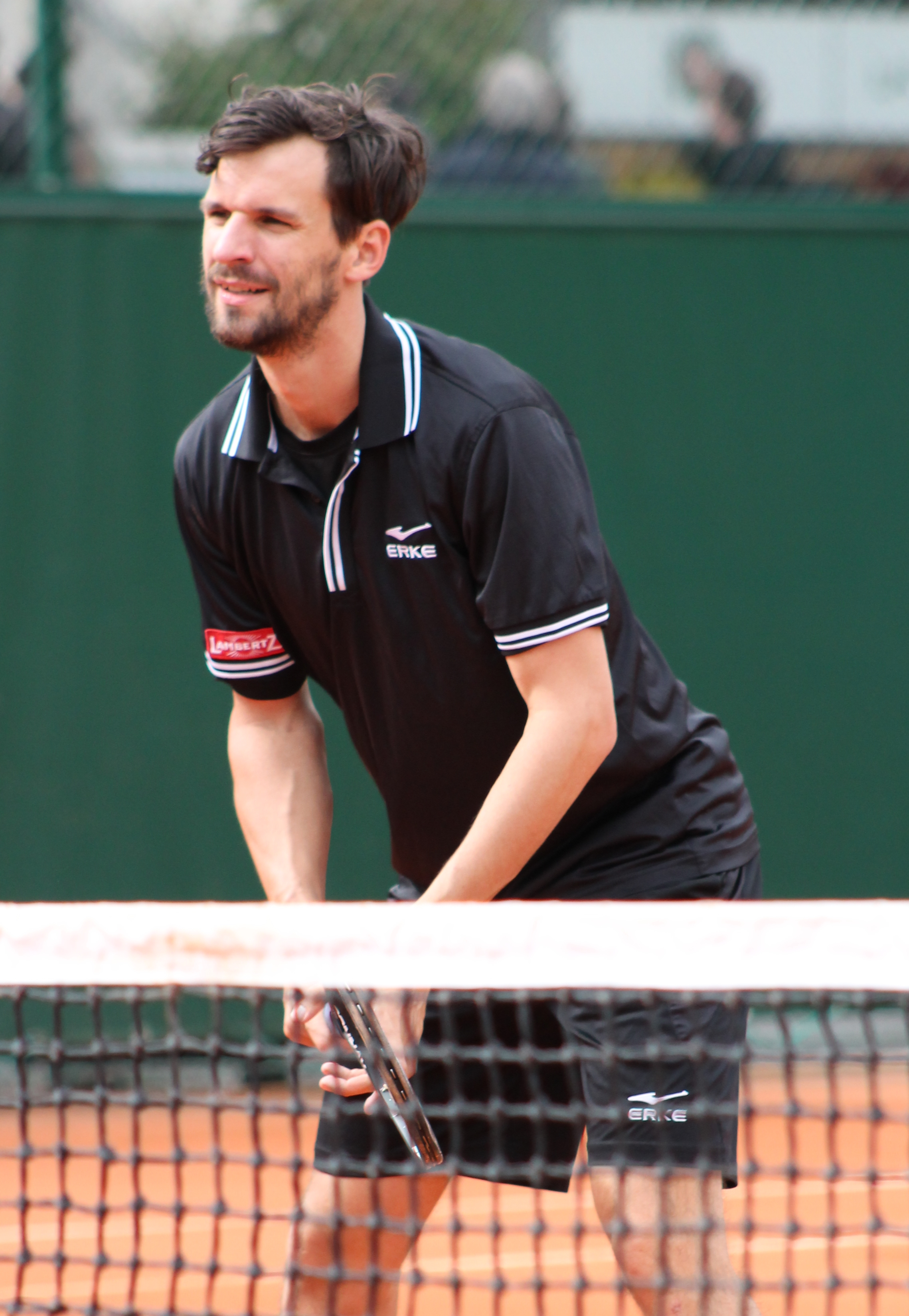 Petzschner RG13 (3)